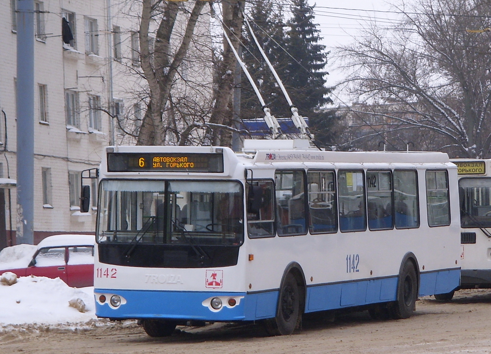 ЗиУ-682Г-16.05